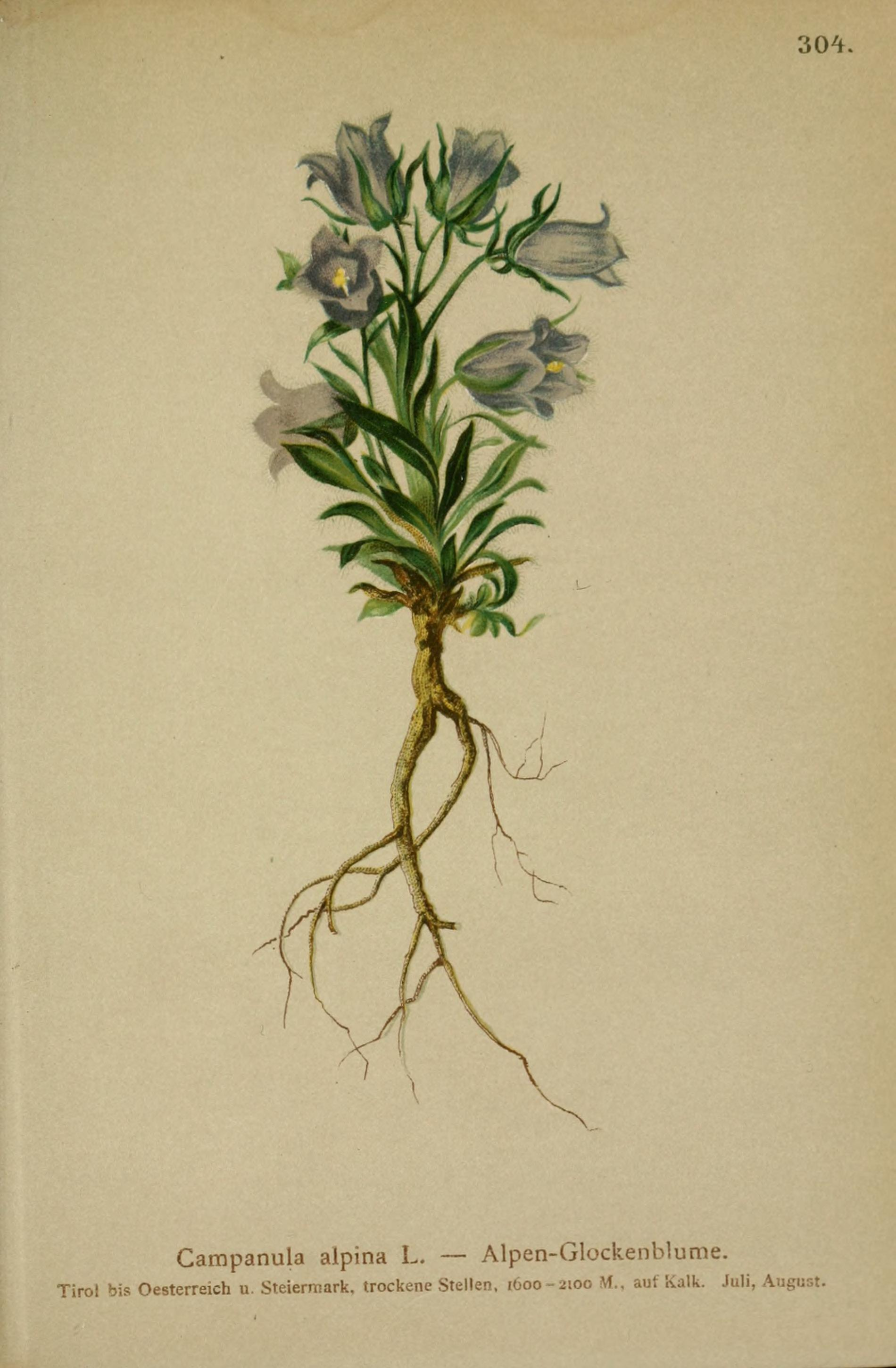 Atlas der Alpenflora / herausgegeben vom Deutschen und Oesterreichischen Alpenverein ; nach der Natur gemalt von Anton Hartinger ; mit Text von K.W. v. Dalla Torre.